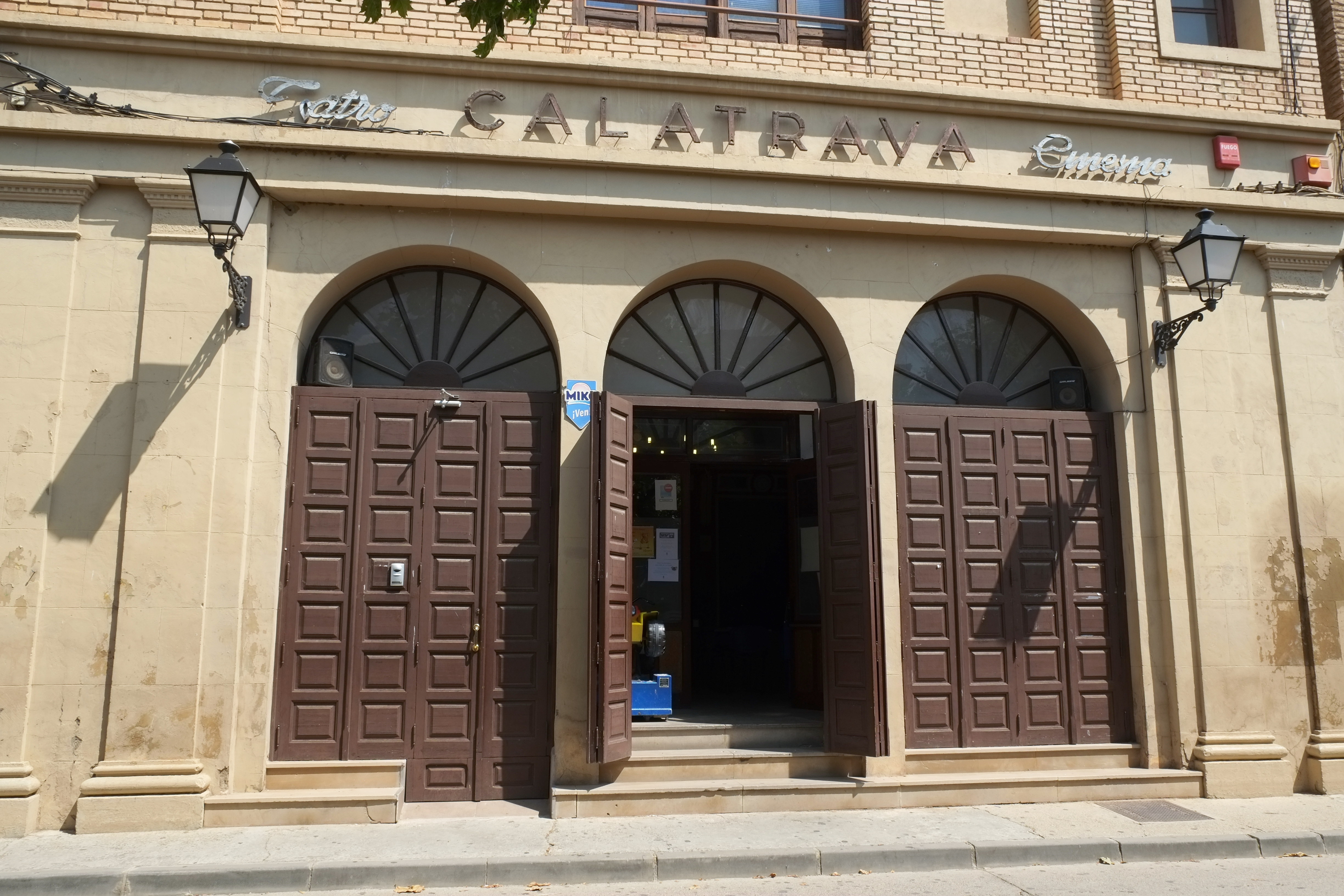 Cinema Calatrava in Fitero in Navarra (Spanien)